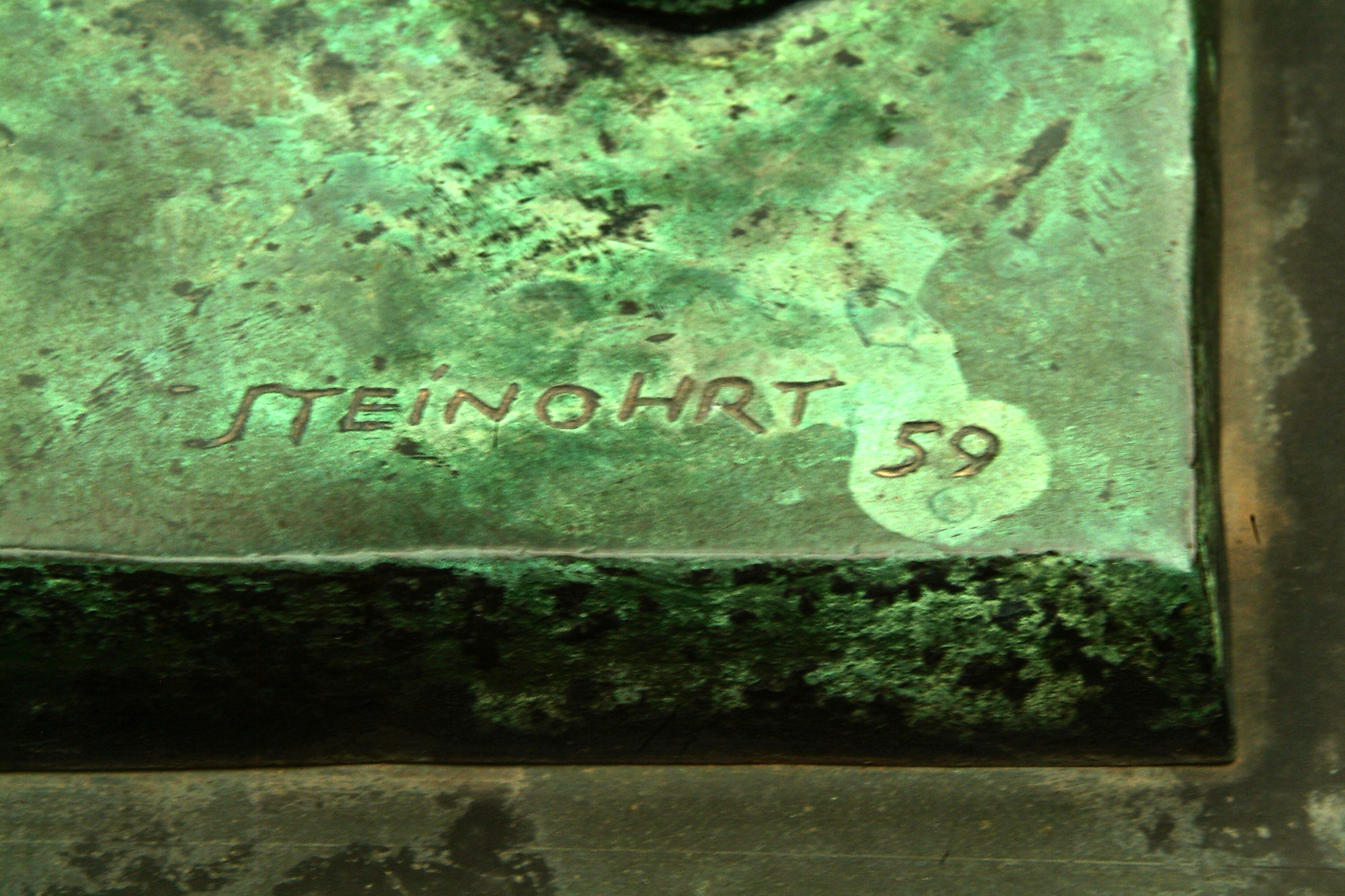 Die Skulptur "Junge mit Drachen" von Ingeborg Steinohrt|Ingeborg Steinohrt von 1959 wurde ursprünglich vor der "Volksschule Meldaustraße" aufgestellt. Heute schmückt die Figur die Eingangsfront der Goetheschule - Aussenstelle An Mußmanns Haube" in Hannover - Herrenhausen (Signatur der Künstlerin am Sockel der Figur).